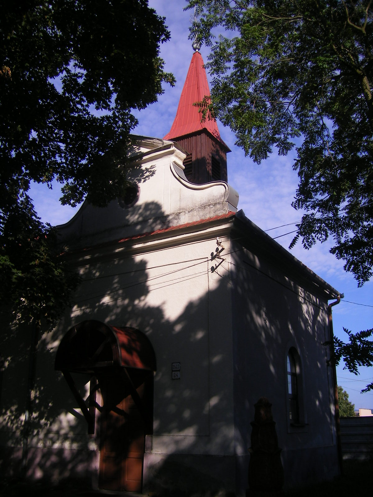 Nána - katolikus templom